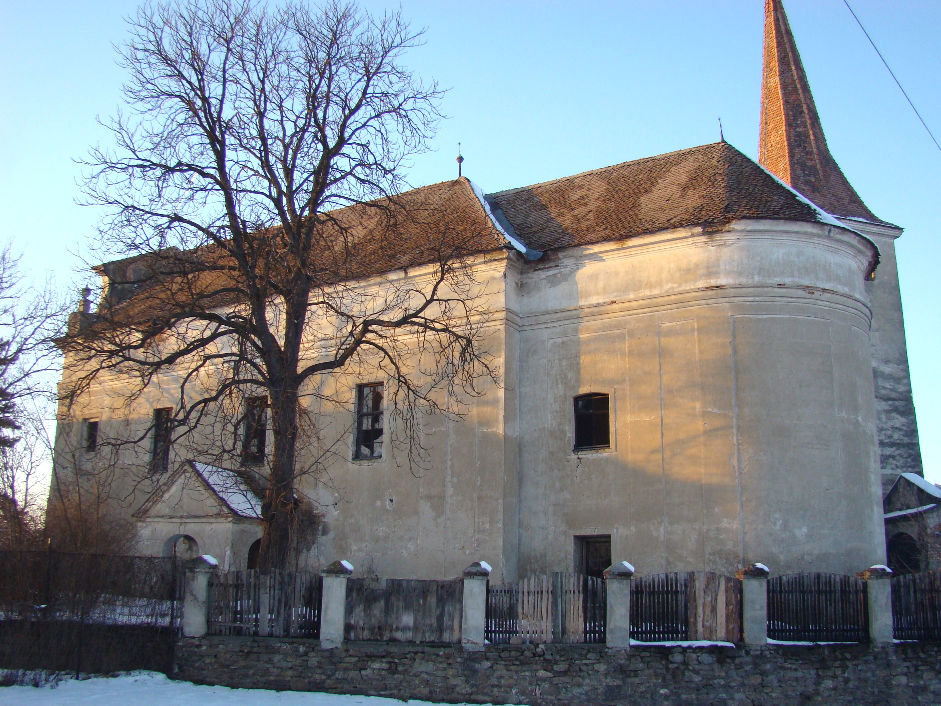 Ansamblul bisericii evanghelice, sat Hoghilag; comuna Hoghilag